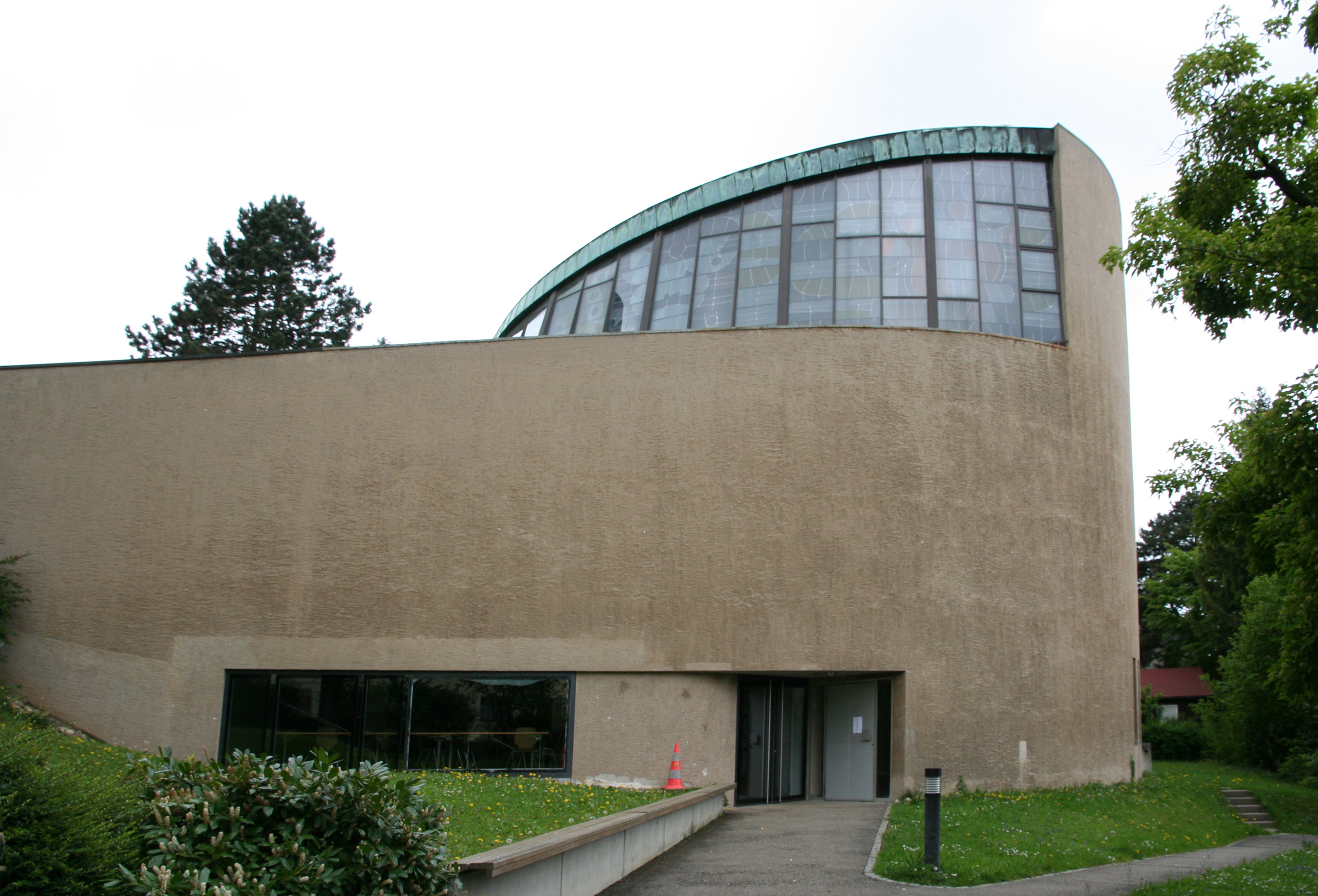 Römisch-katholische Kirche Bruder KIaus Basel, Zugang zur Krypta